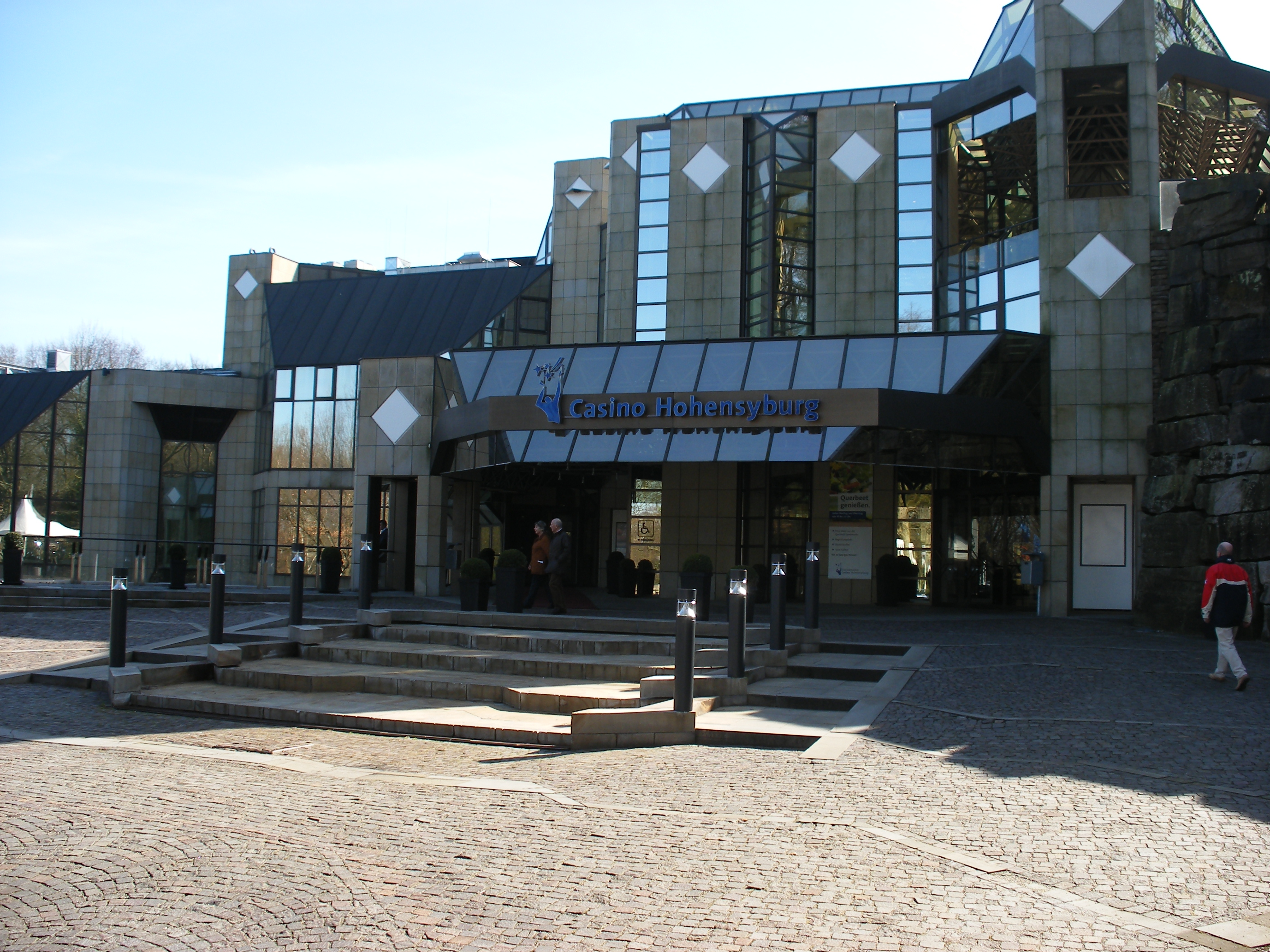 Frontseite der Spielbank Hohensyburg